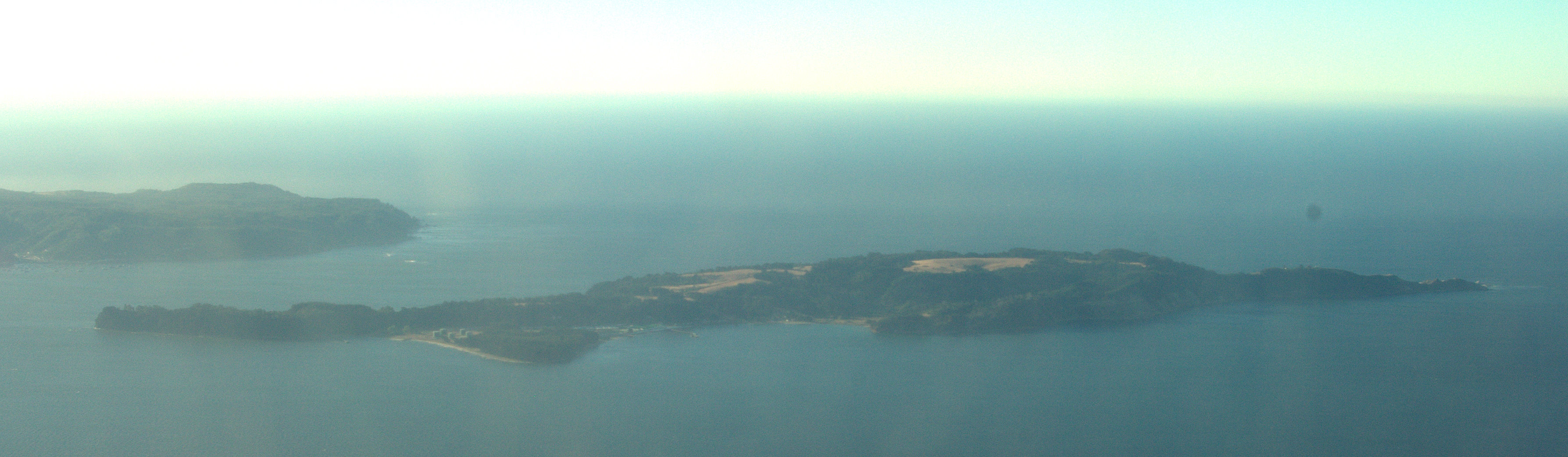 Isla Quiriquina